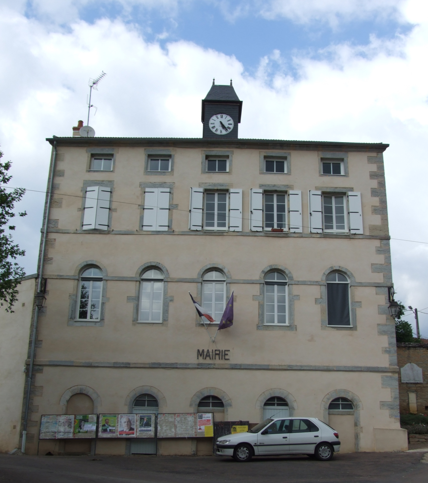 Mairie de Clémencey, Clémencey, Côte-d'Or, Bourgogne, FRANCE